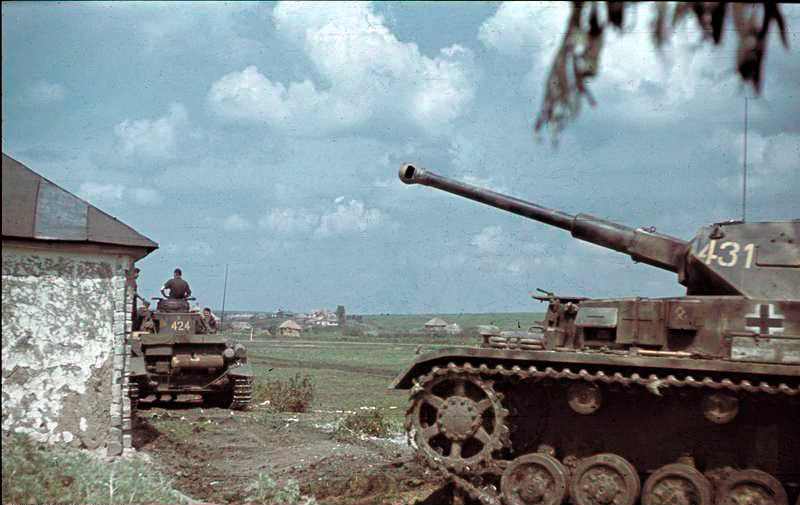 Deutsche Panzereinheit in Bereitschaft in der Ukraine, Sommer 1941 Information added by Wikimedia users.(chybné, jedná se o léto 1942 viz. Panzerkampfwafen IV Ausf. F2, verze vyráběná od května 1942, dá se tedy předpokládat, že se jedná o fotografii z vých. Ukrajiny, oblast Donu, Kubáň / wrong, date is summer 1942, see Panzerkampfwafen IV Ausf. F2, model producing from May 1942, photo maybe east Ukraine, area Don, Kuban)